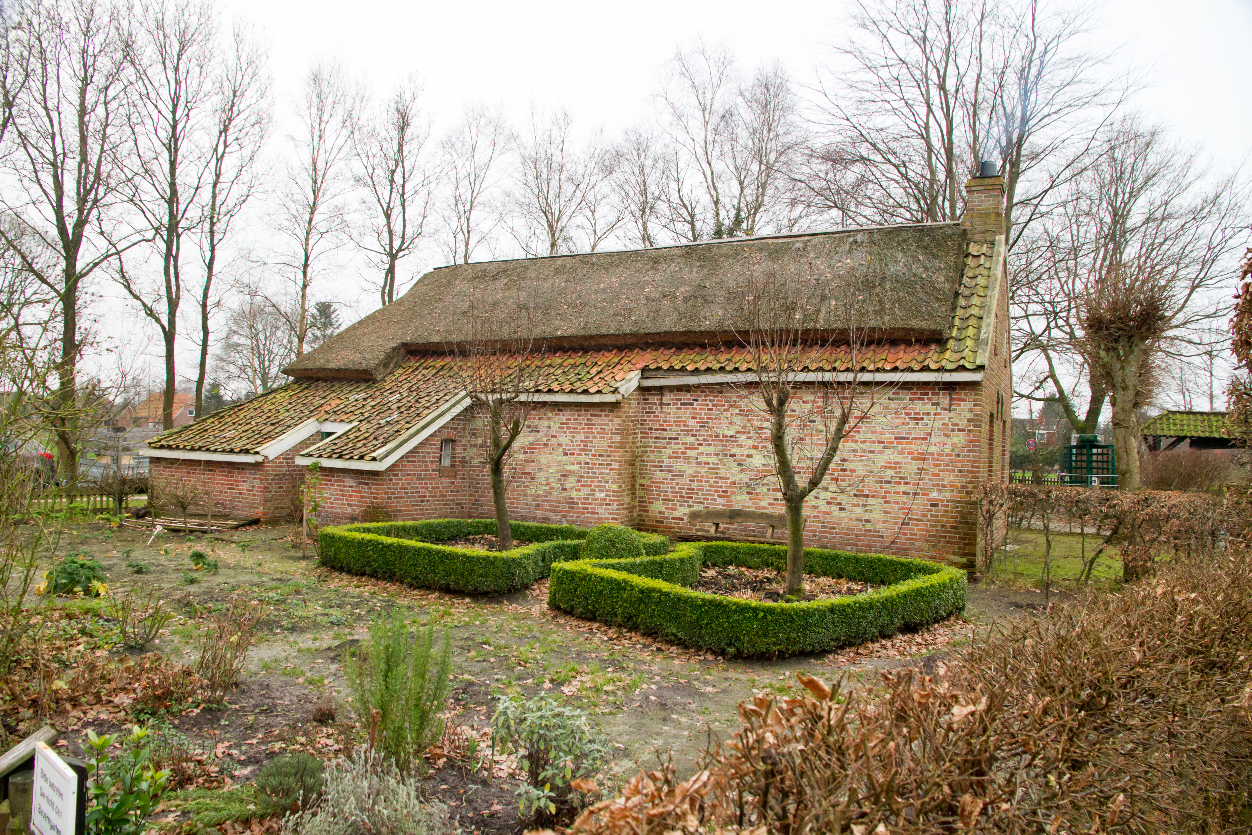 Kolonistenhaus mit Garten zur Selbstversorgung im Moormuseum Moordorf